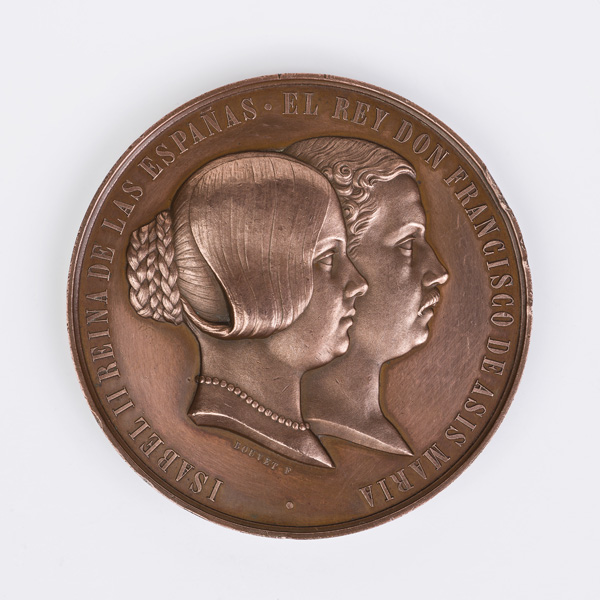 Medalla. Medalla conmemorativa del nacimiento de la princesa de Asturias.